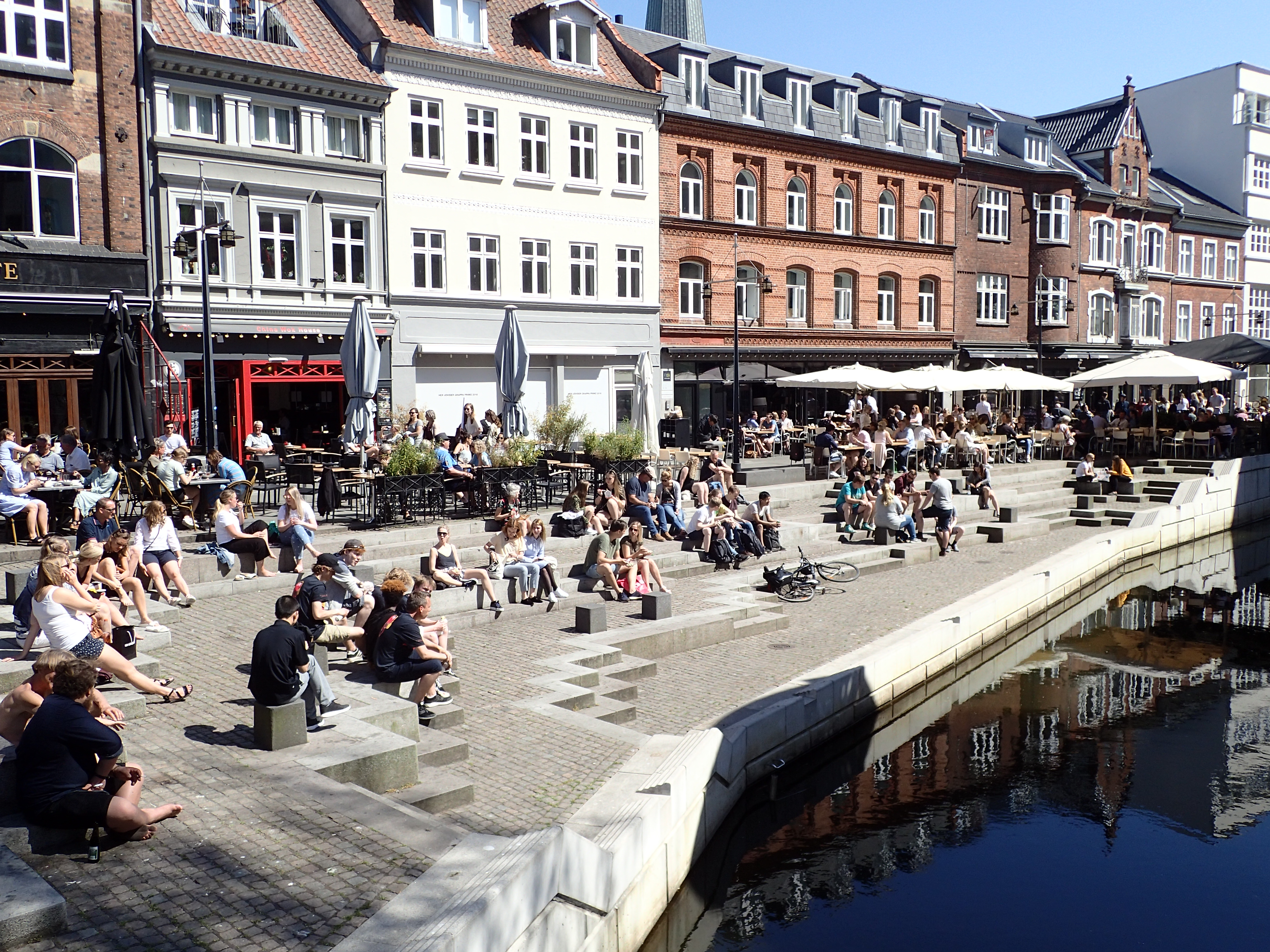 Vadestedet